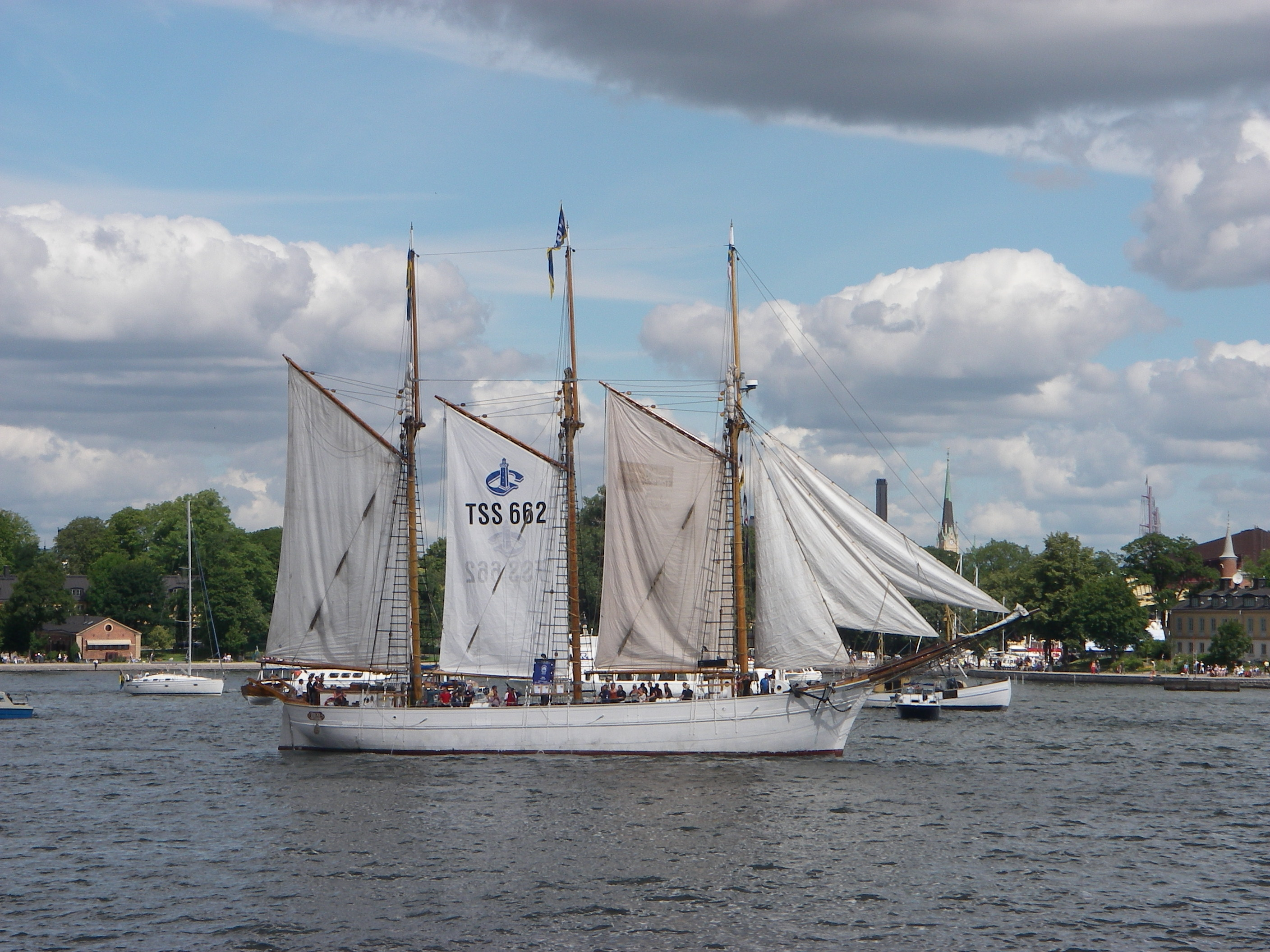 Skonaren Ingo på väg ut efter Tall Ships Races stop i Stockholm 2007. This is an image of a protected Swedish ship, with call sign SIXW .